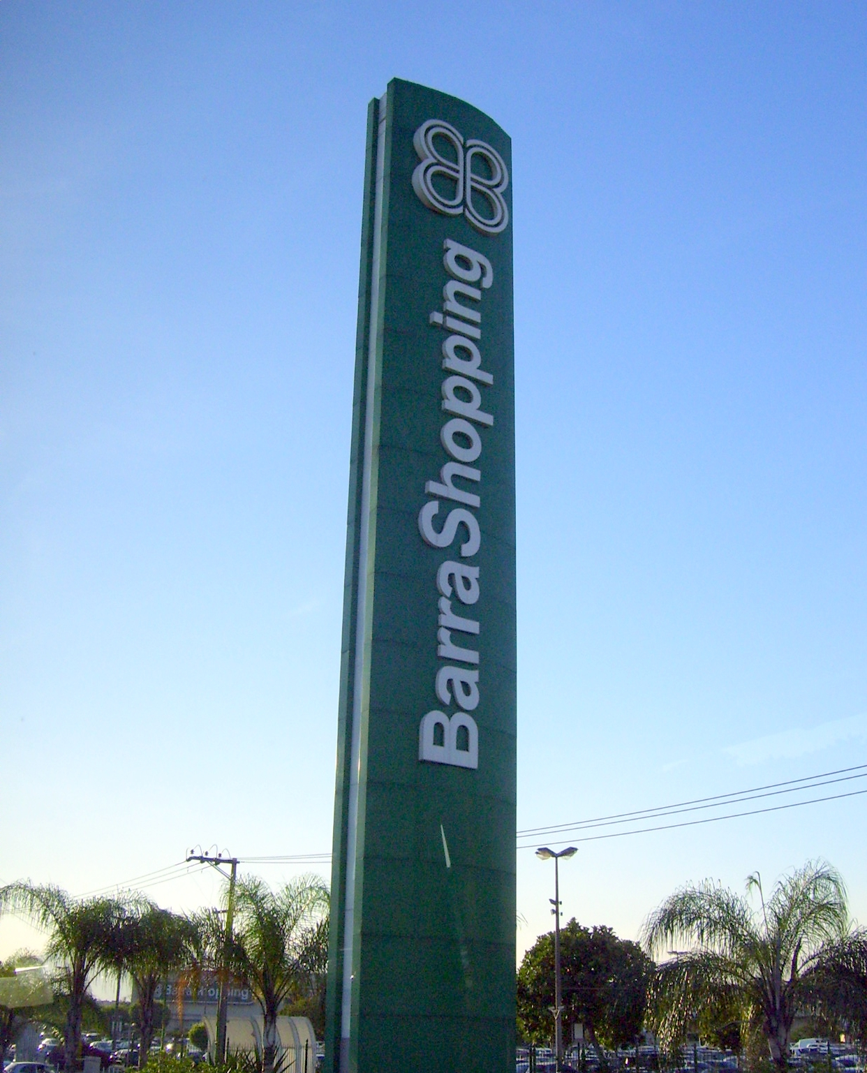 Placa do BarraShopping, no Rio de Janeiro, RJ, Brasil.